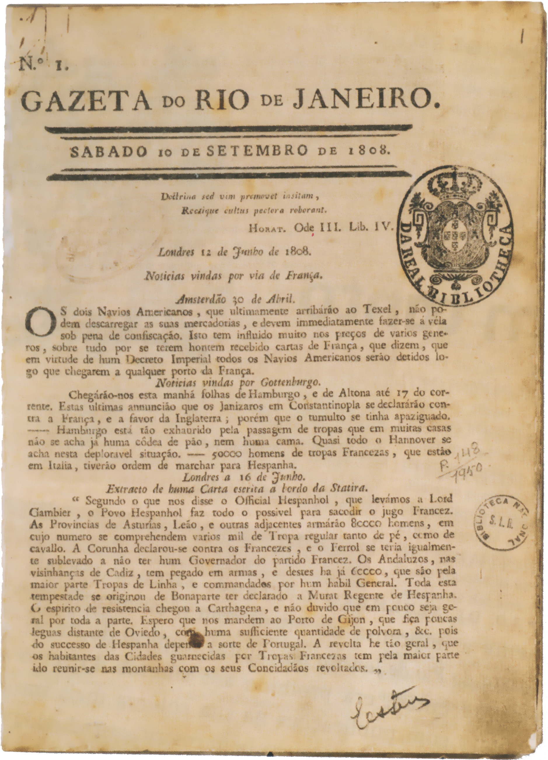 Primeira página do número 1 da Gazeta do Rio de Janeiro, primeiro jornal publicado no Brasil.